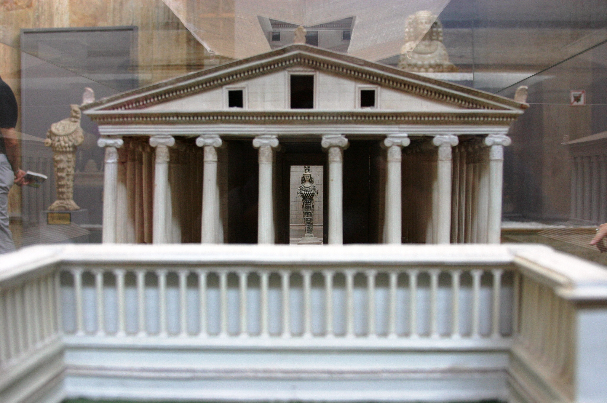 Modelo do Artemisium com a Artemis Ephesia